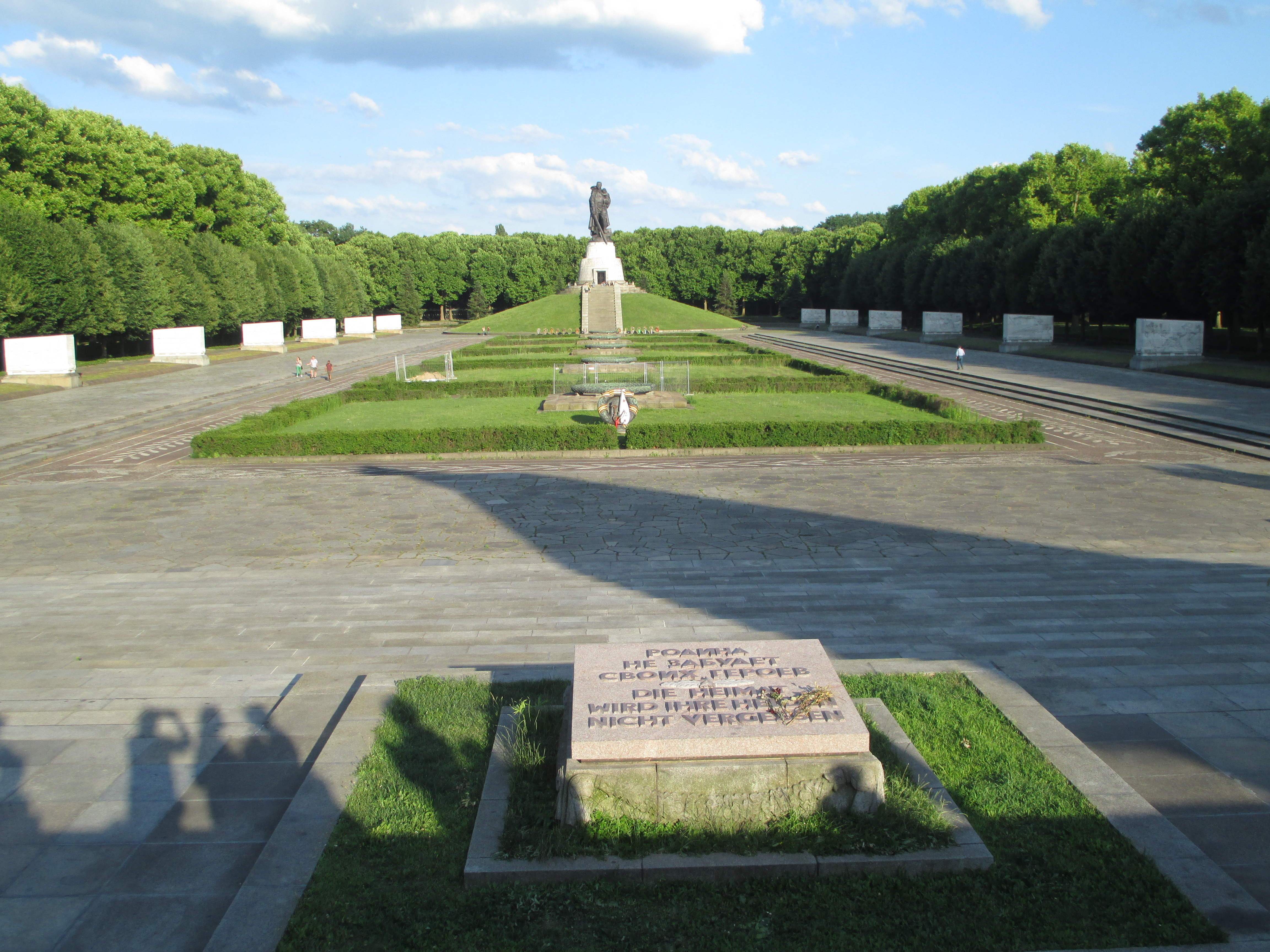 אנדרטת המלחמה הסובייטית בפארק טרפטו בברלין